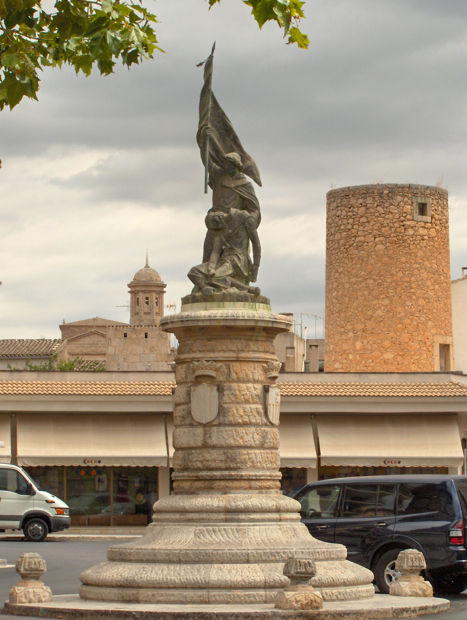 Estàtua a Llucmajor (Mallorca) en memòria del Rei Jaume III de Mallorca que fou mort a la batalla de Llucmajor.